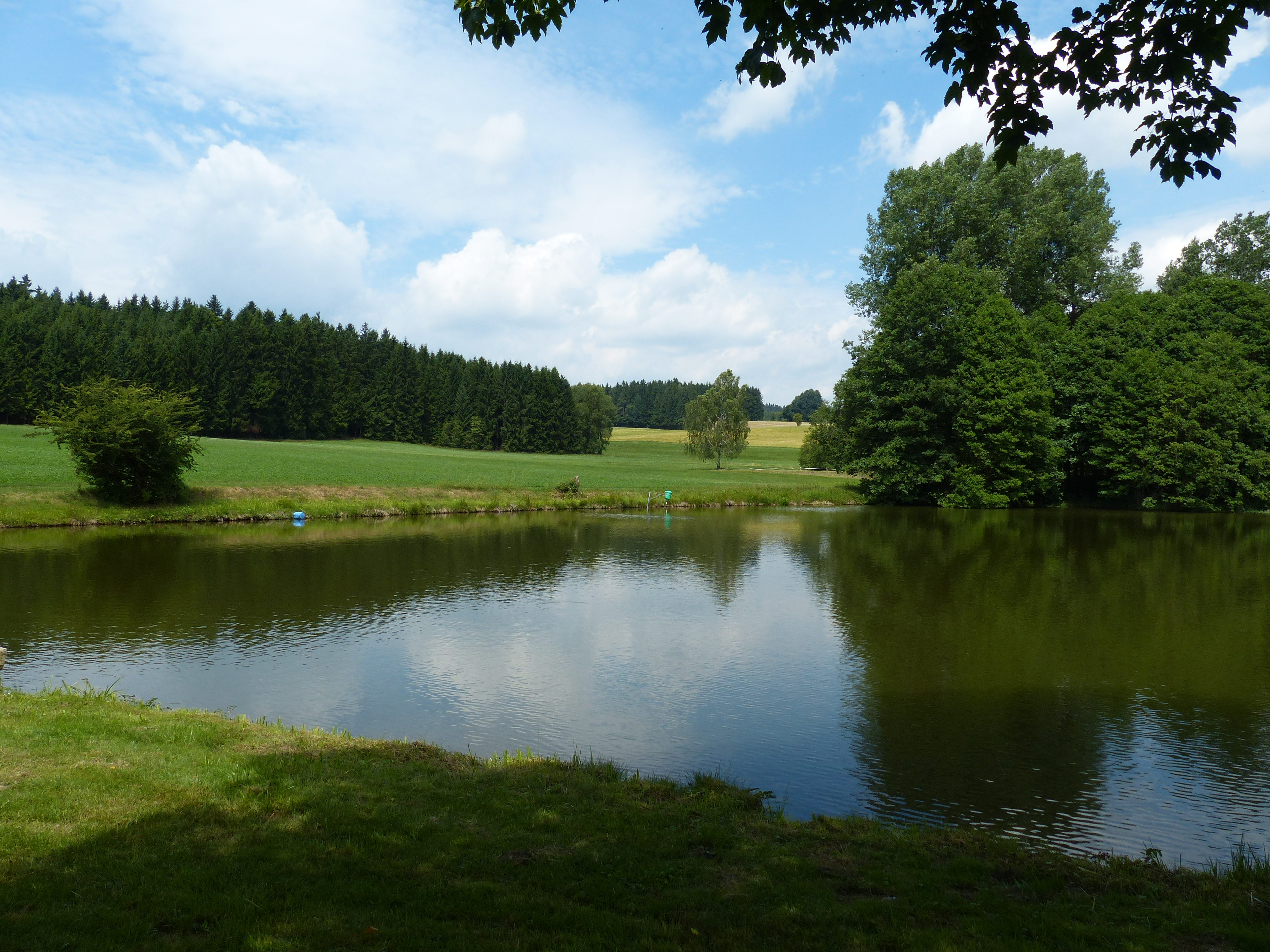 Brücklasteich unterhalb der Wüstung Jaythof